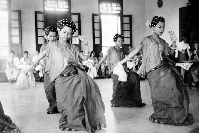 Repronegatief. Danseressen dansen in Serimpi-stijl aan het hof van de sultan van Bima, Soembawa